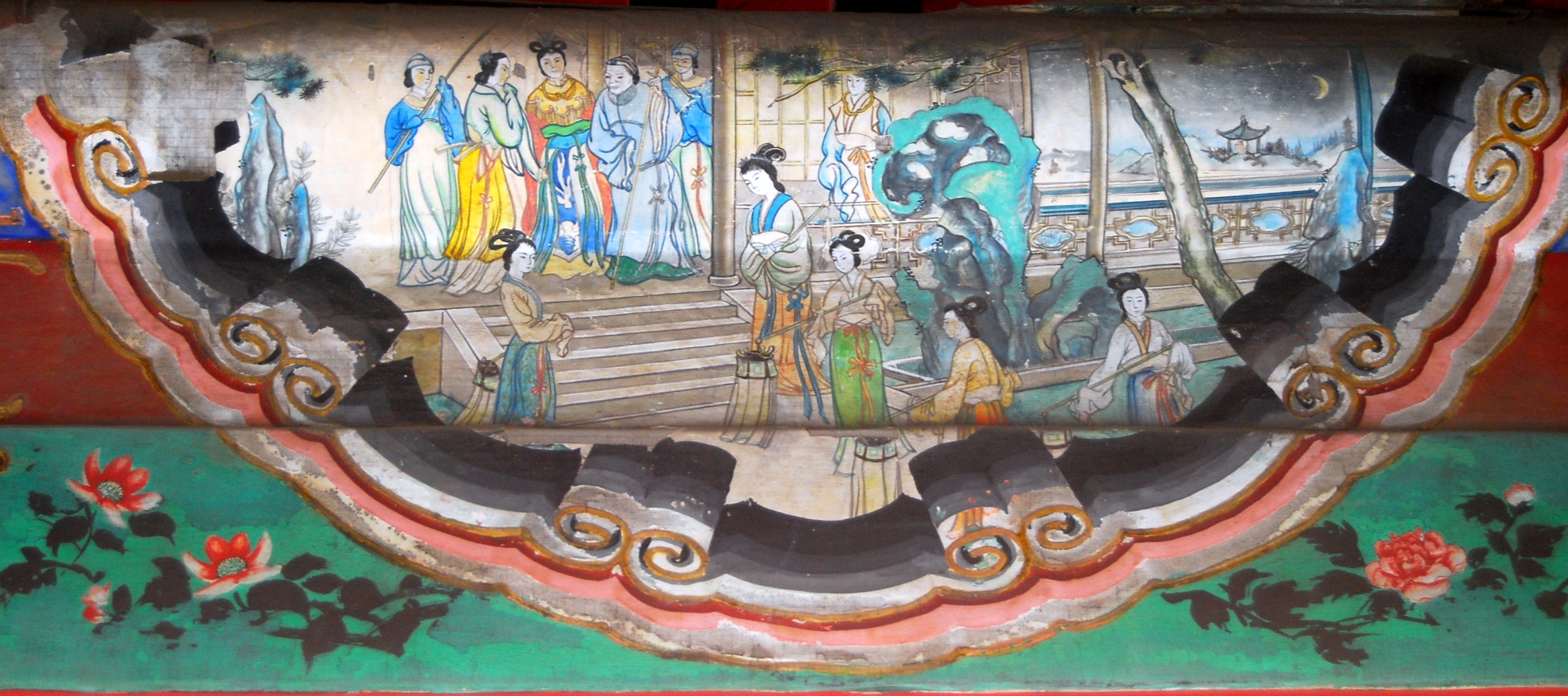 颐和园长廊上的彩绘：元春省亲